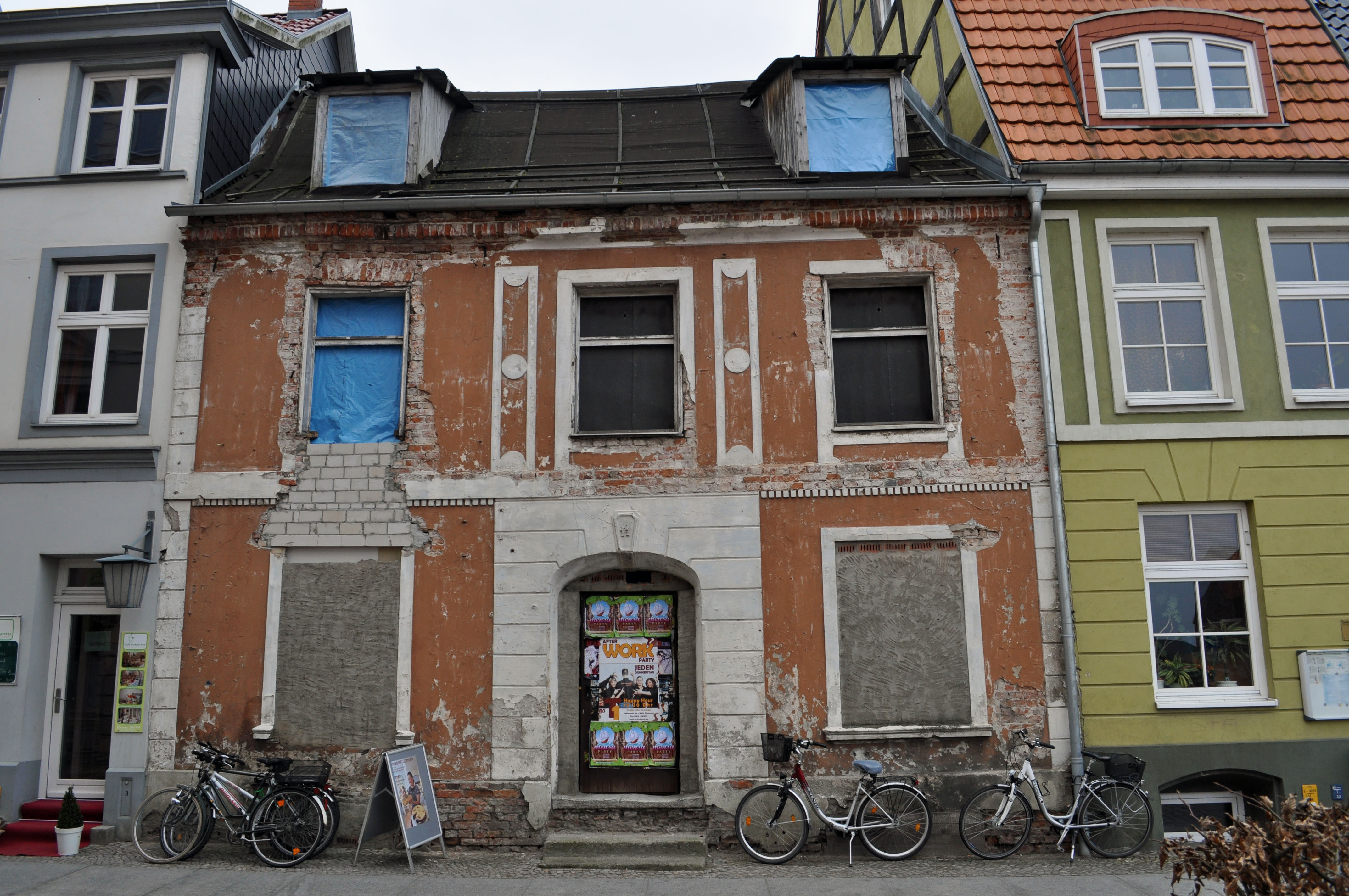 Gebäude bzw. Gebäudedetail in Stralsund. Straße und Hausnummer siehe Dateiname.